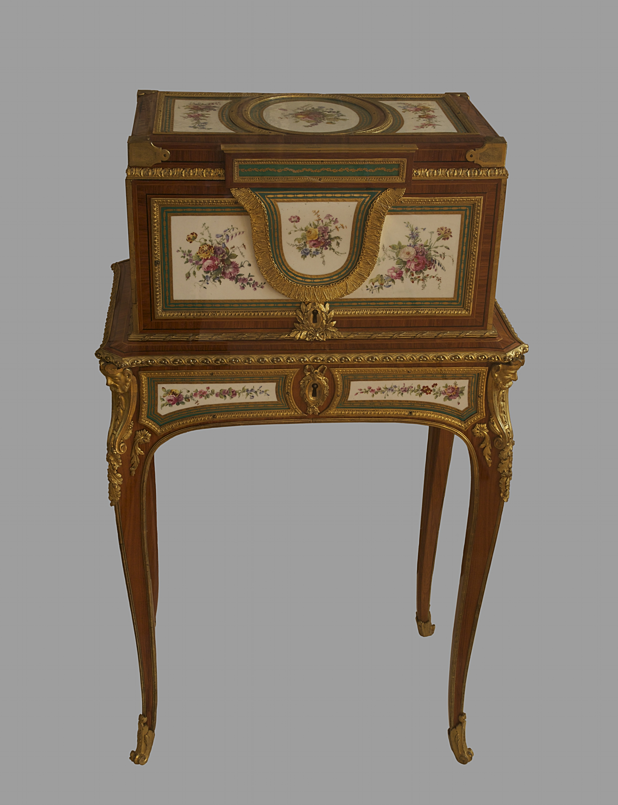 Coffre à bijoux de Marie-Antoinette dauphine